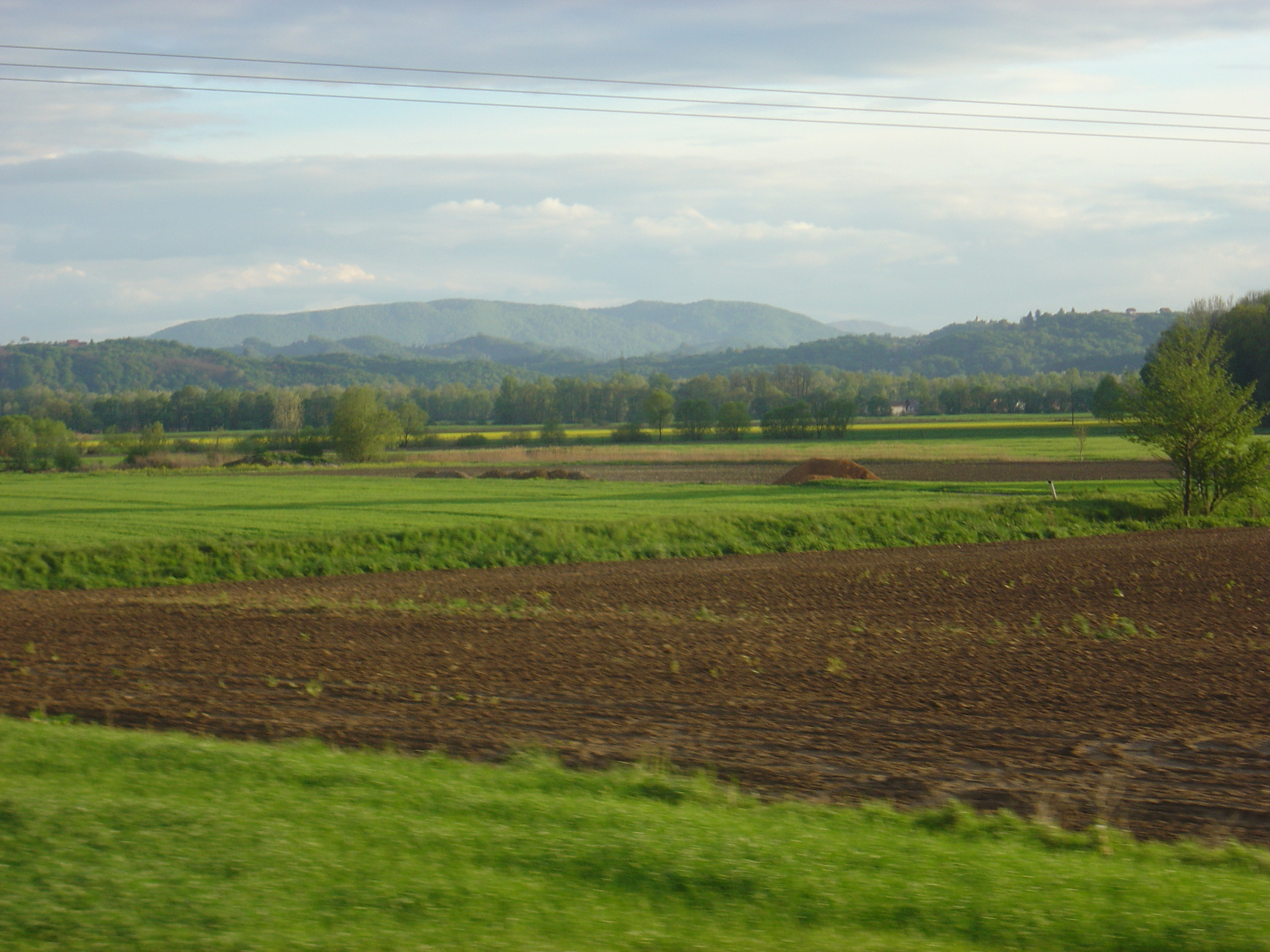 Ormož, Slovenia